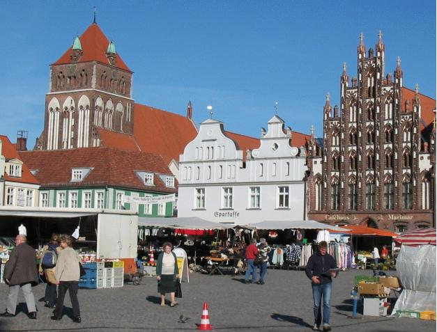 Greifswalder Marktplatz, Westseite, Blick auf die "Dicke Marie". Fotografiert von Harald im Sept. 2003, modifiziert durch Ausschnitt GNU-FDL